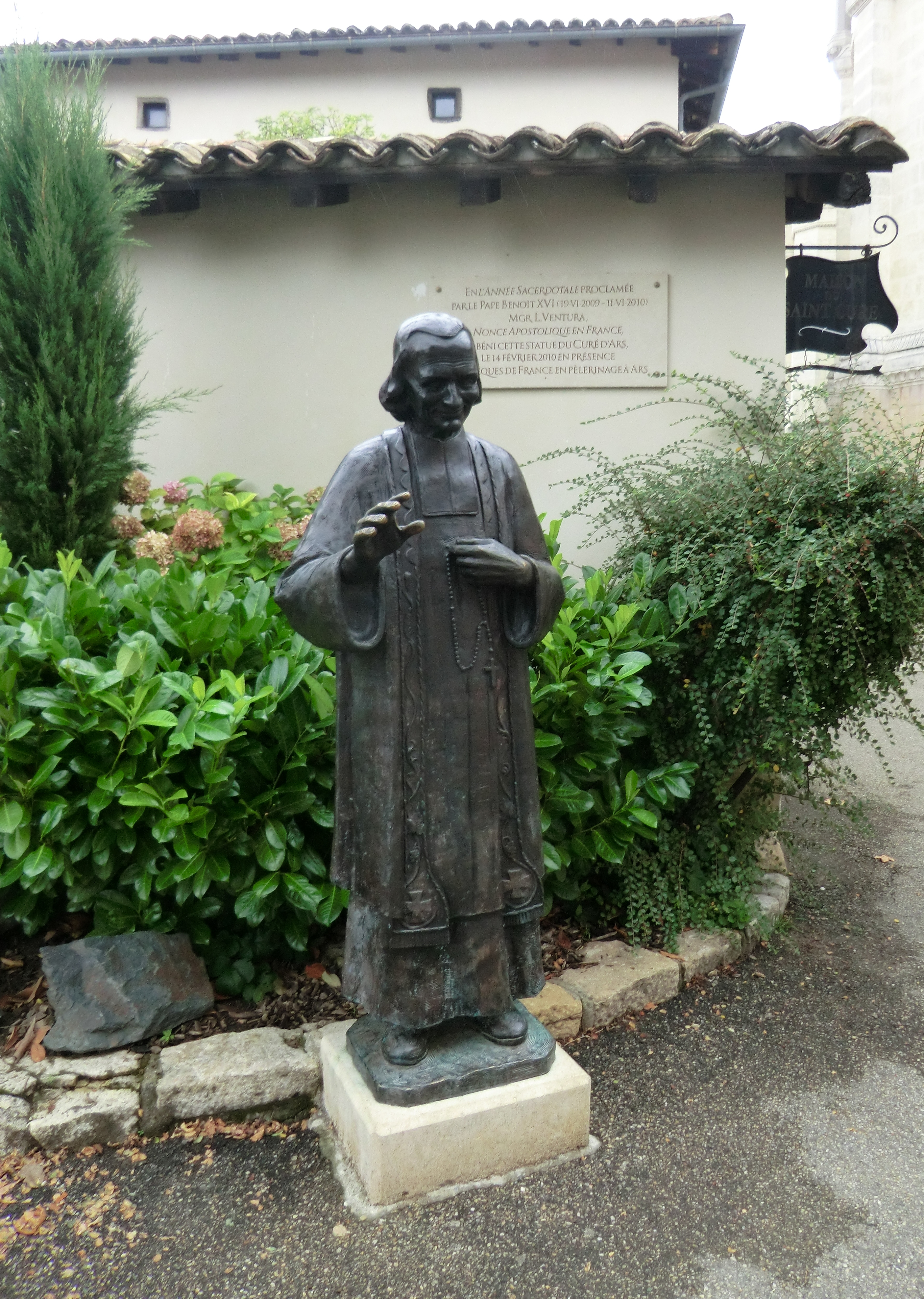 Presbytère du curé d'Ars. .